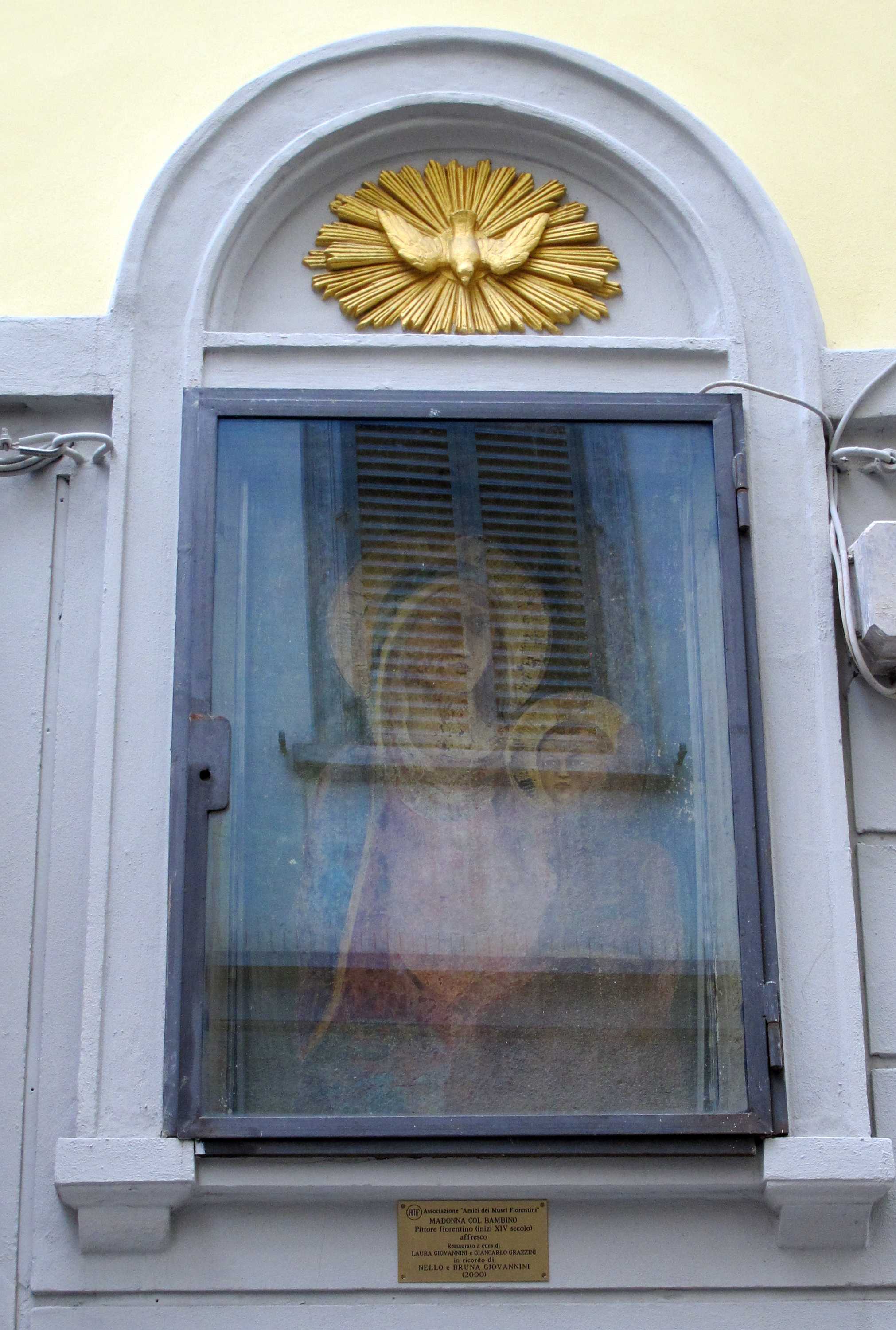 Via fiesolana 18, casa con tabernacolo su via di mezzo 02. pittore fiortentino del primo trecento